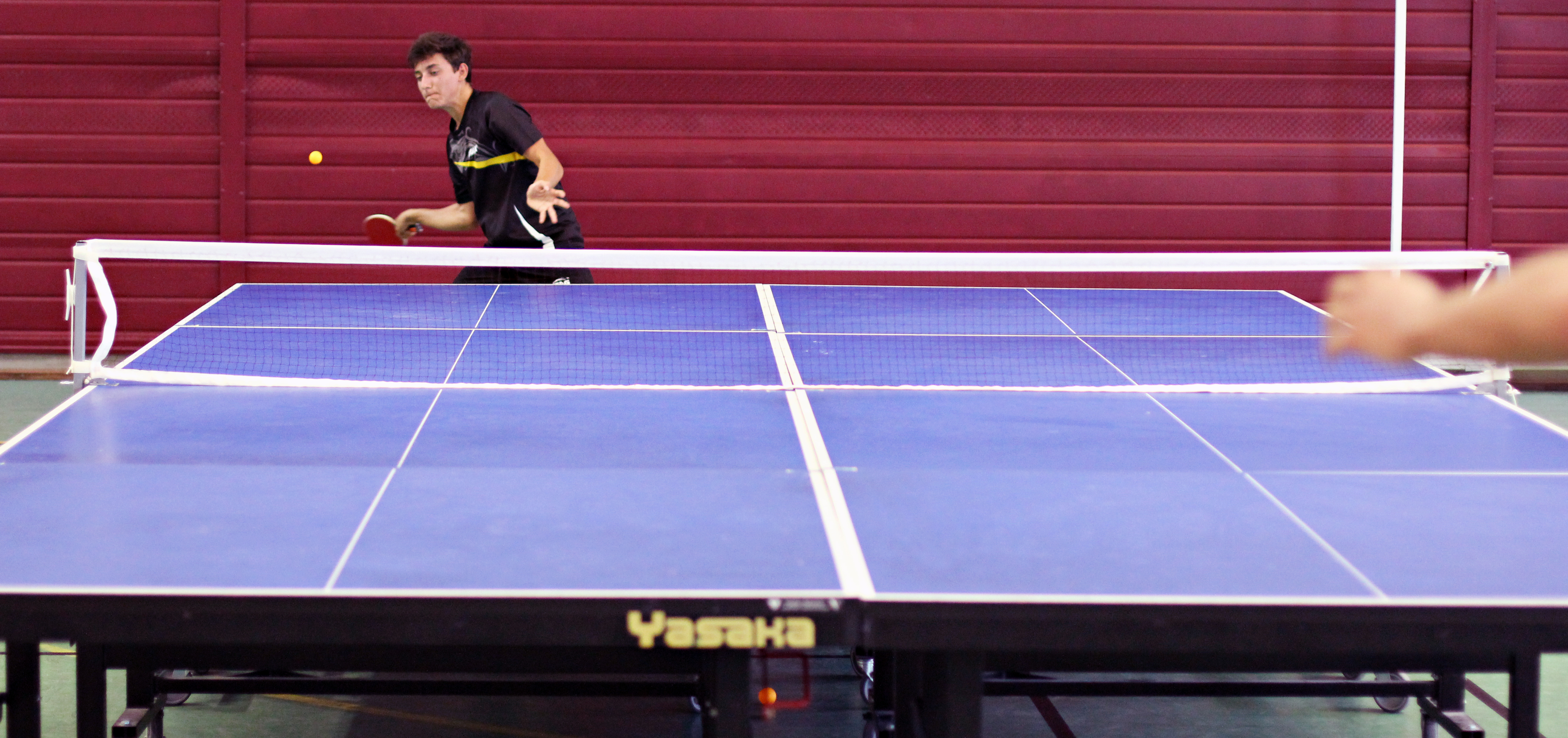 Une vaste aire de jeu permet toutes les folies